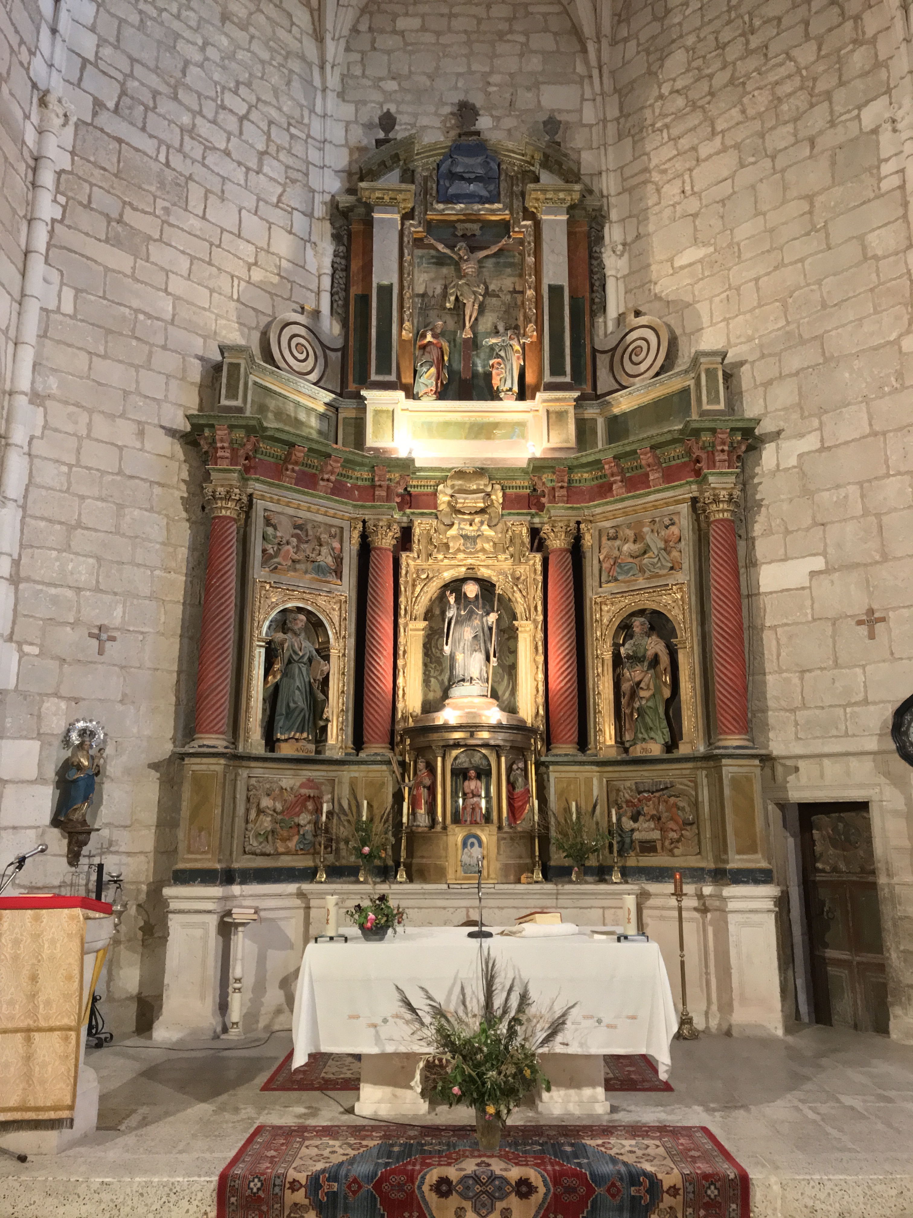 AltarMayorCitoresdelParamo